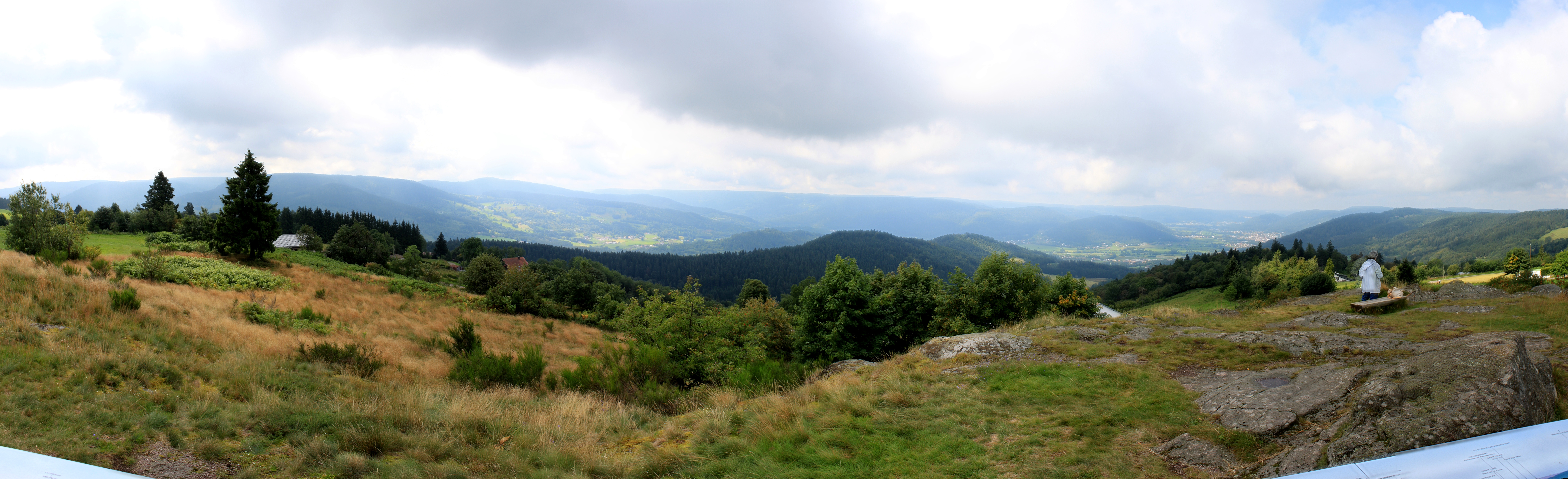 Vue de la table d'orientation, Le Haut du Tôt, Vosges, Lorraine, France